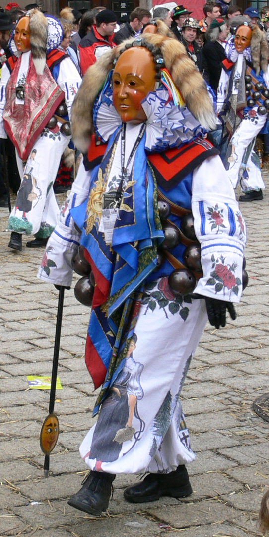 Narrenzunft Schwenningen, Figur: Hansel Veranstaltung: Narrensprung beim Narrentreffen Meßkirch 2006